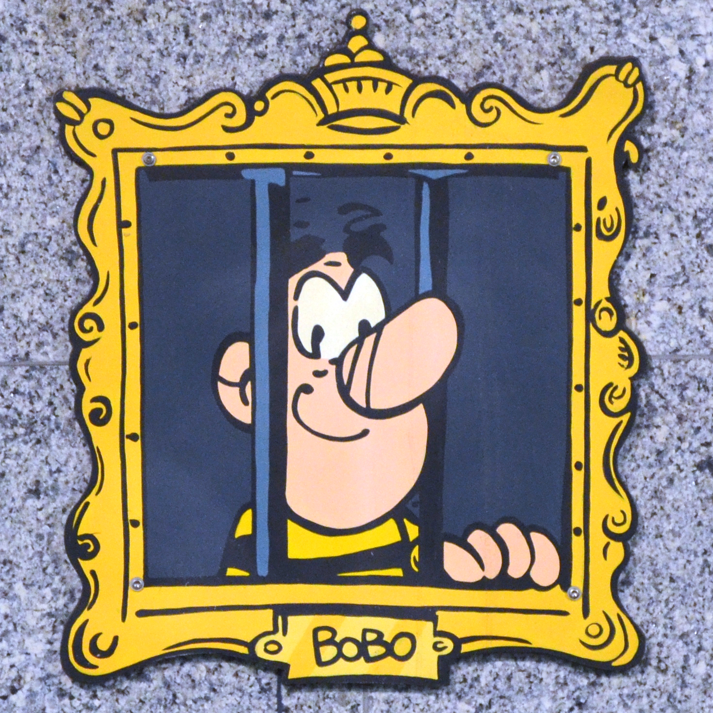 Charleroi (Belgique) - Station Janson du métro léger. Bobo.